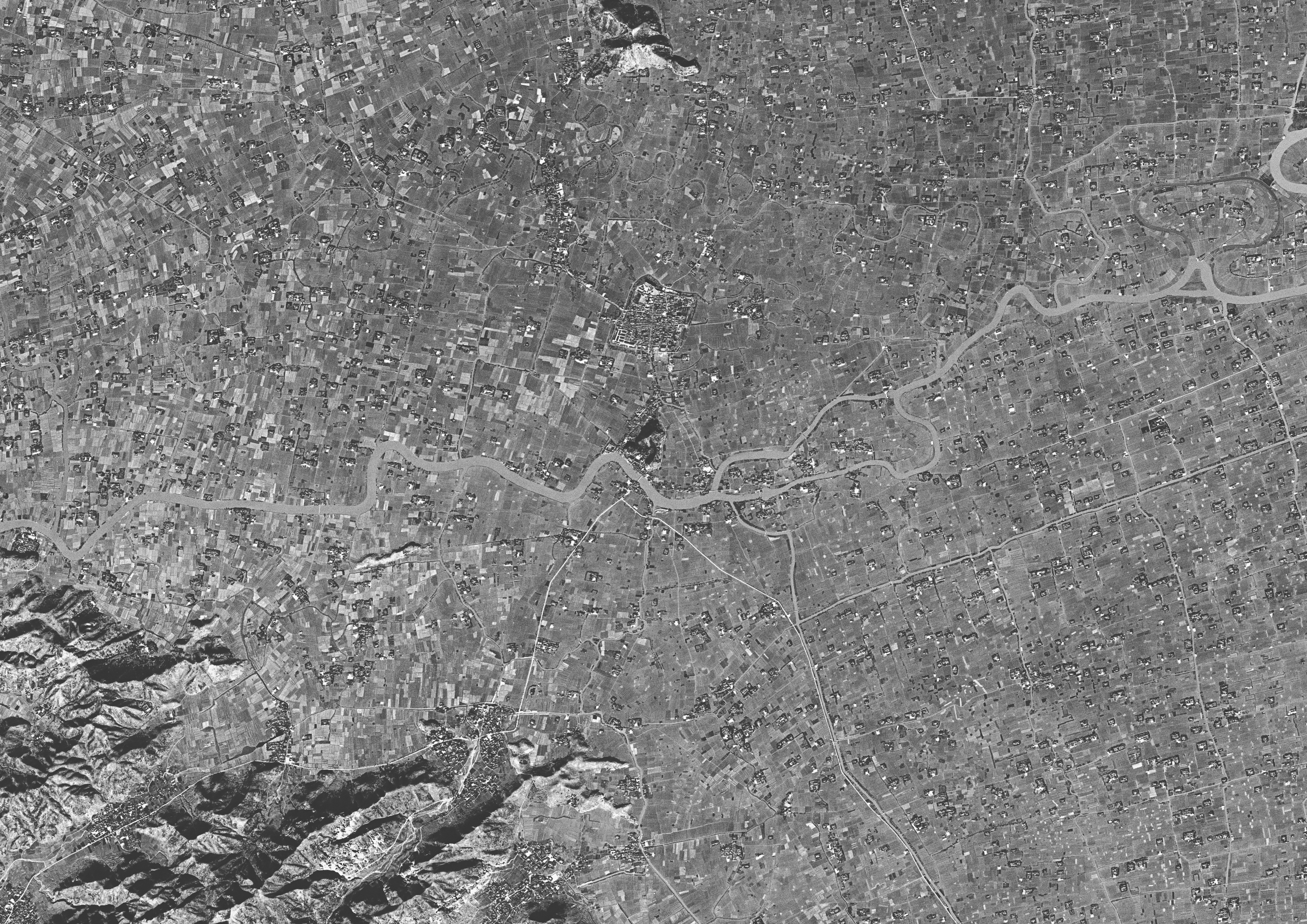 1970年12月原新河所城及周边地区卫星地图。